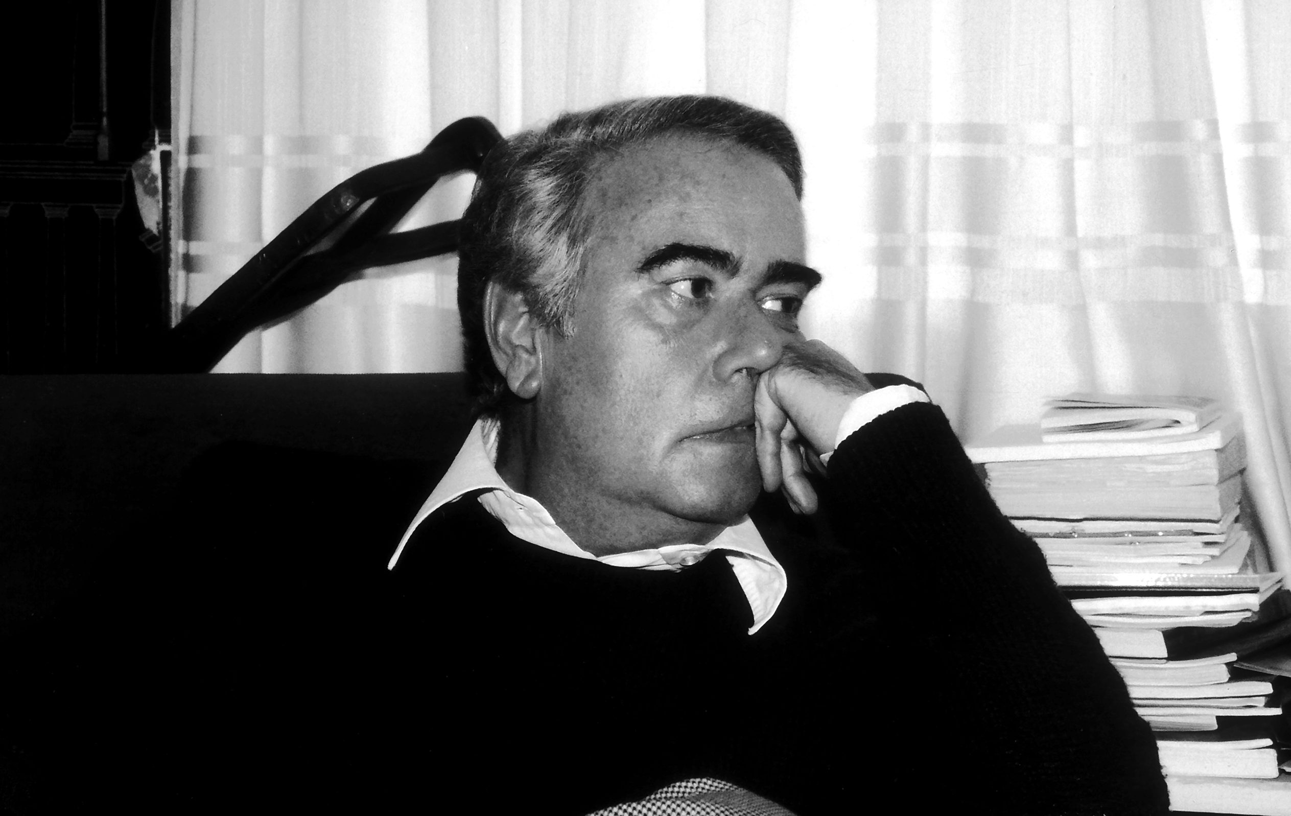 El escritor español Juan Perucho Gutiérrez en 1992